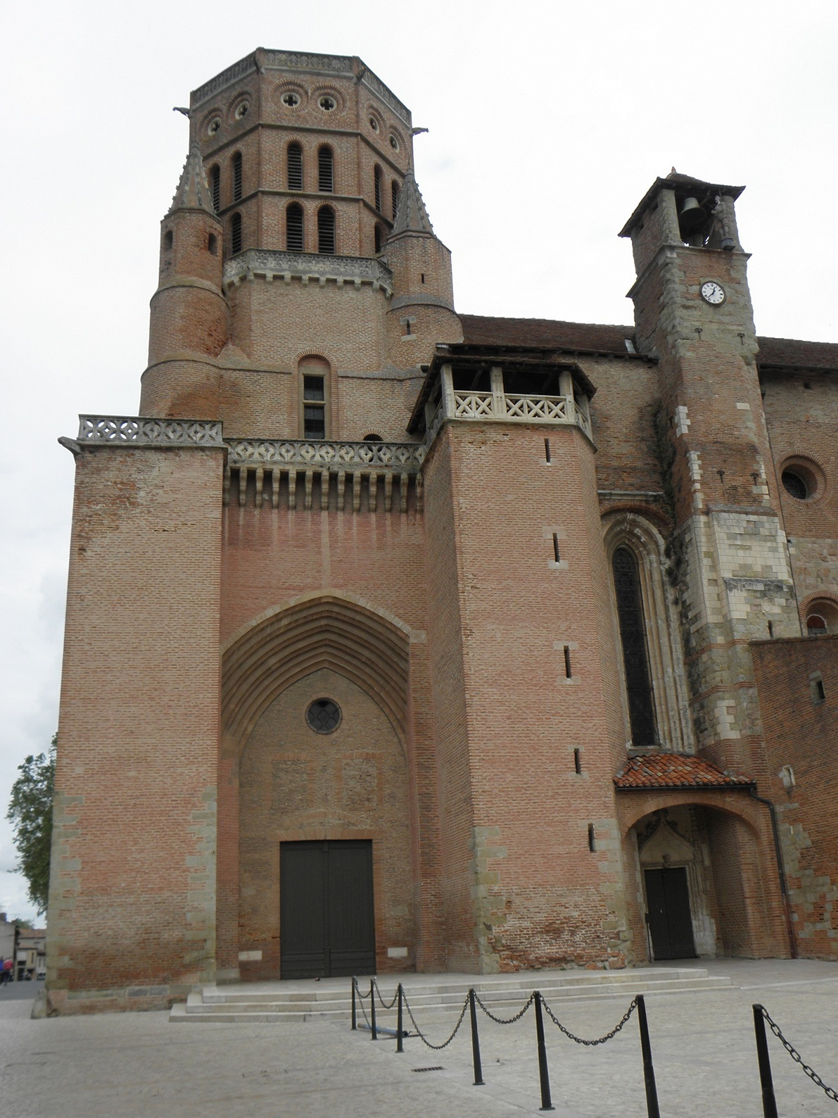 Vue méridionale de la tour-clocher et du jacquemart de la cathédrale Saint-Alain de Lavaur (81). .